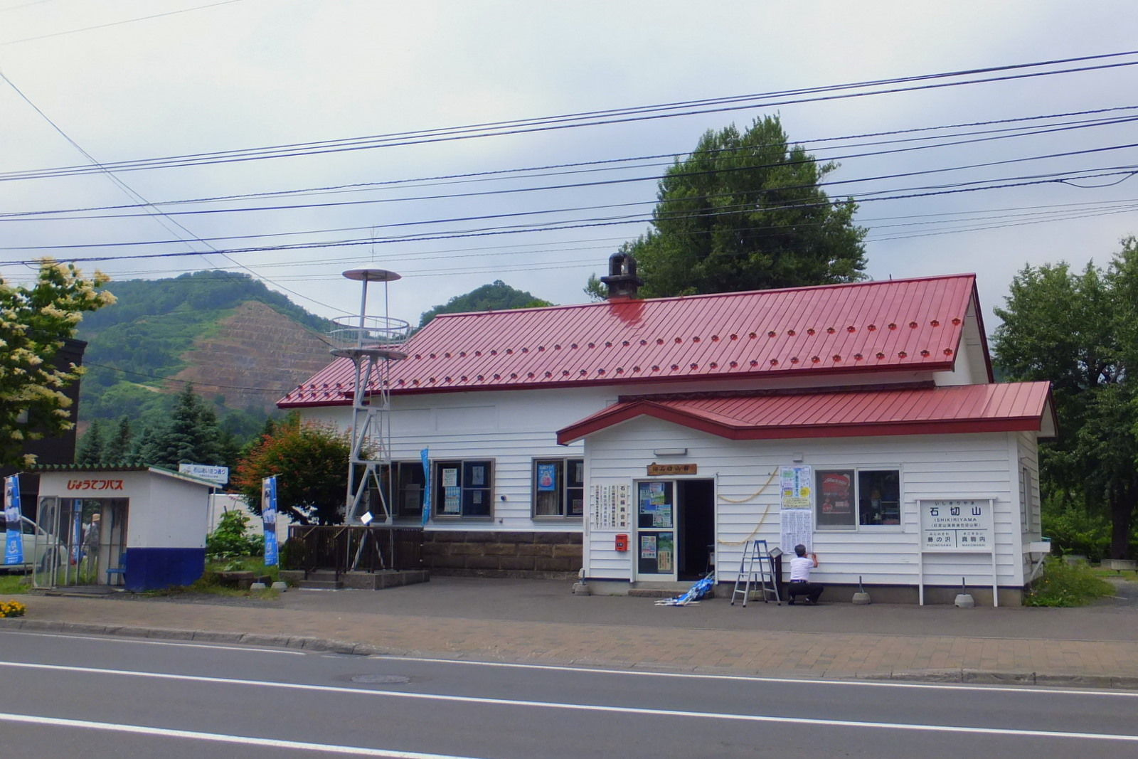 旧 定山渓鉄道 石切山駅駅舎 1918～1969（Jozankei railway Ishikiriyama station）